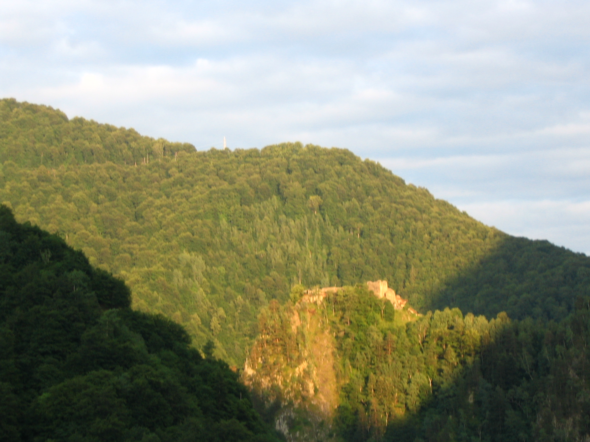 Citadelle de Arefu